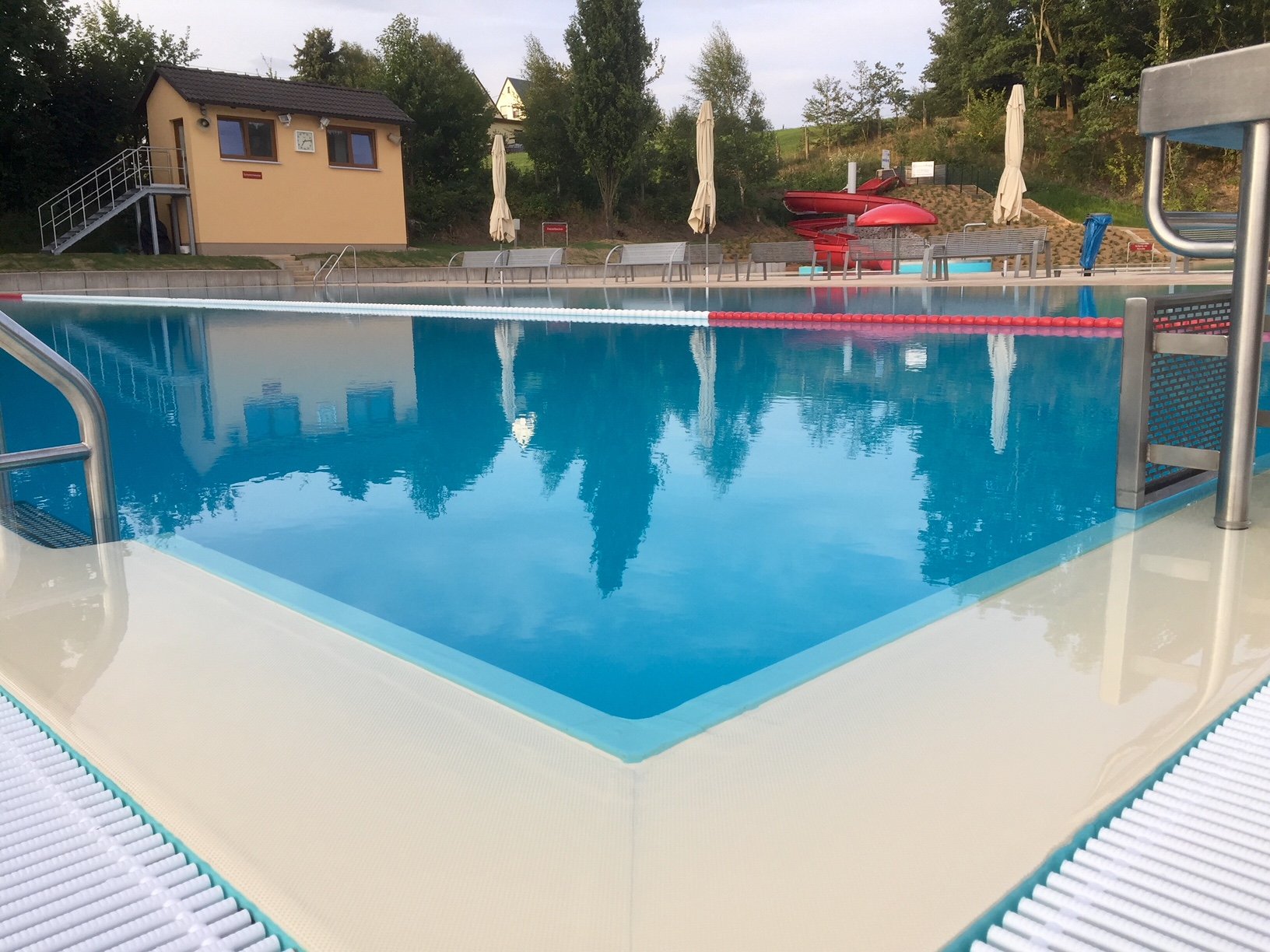 Freibad Hartmannsdorf bei Kirchberg Badeplatte mit Schwimmerbecken, Nichtschwimmerbecken und Rutsche